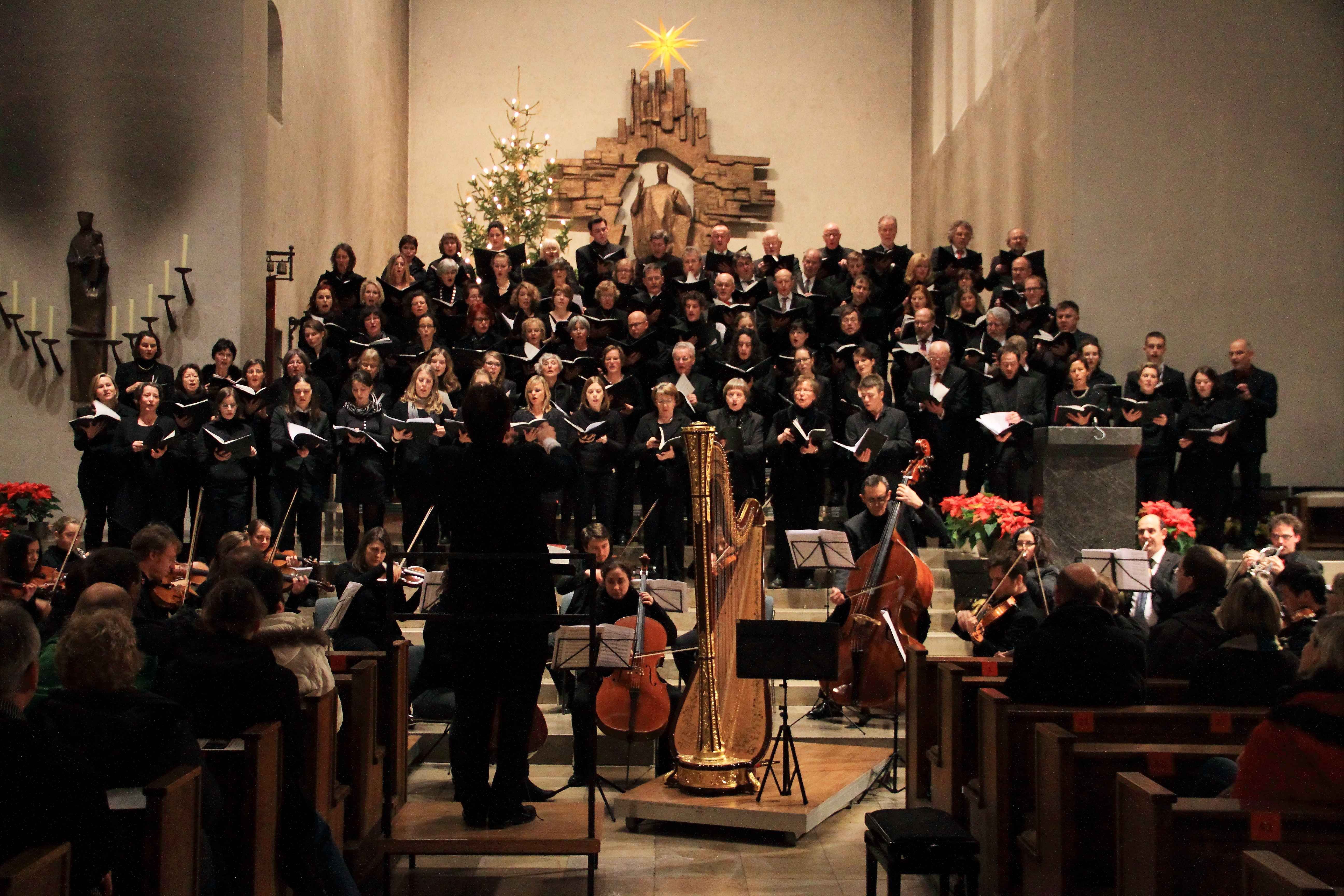 Der Oratorienchor Würzburg mit der Aufführung des Stern von Bethlehem von Josef Rheinberger in der Heiligkreuzkirche Würzburg. Leitung: Matthias Göttemann, Sopran: Anke Endres, Bariton: Janno Scheller, Harfe: Markus Thalheimer.